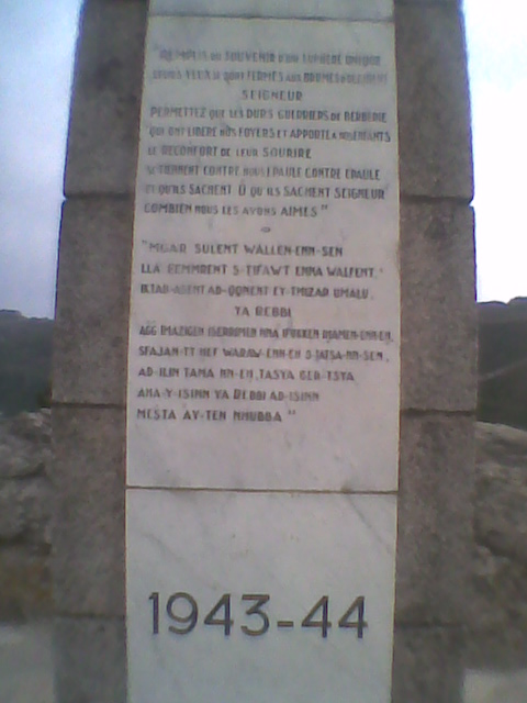 Stèle rendant hommage au sacrifice des Goumiers marocains dans la bataille du col de Teghime les 1er et 2 octobre 1943 et dans les combats pour la Libération de la Corse. « Remplis du souvenir d'une lumière unique leurs yeux sont fermés aux Brumes d'occident, Seigneur, permettez que les durs guerriers de Berberie qui ont libéré nos foyers et apporté à nos enfants le réconfort de leur sourire se tiennent contre nos épaules et qu'ils sachent, ô qu'ils sachent Seigneur combien nous les avons aimés. »